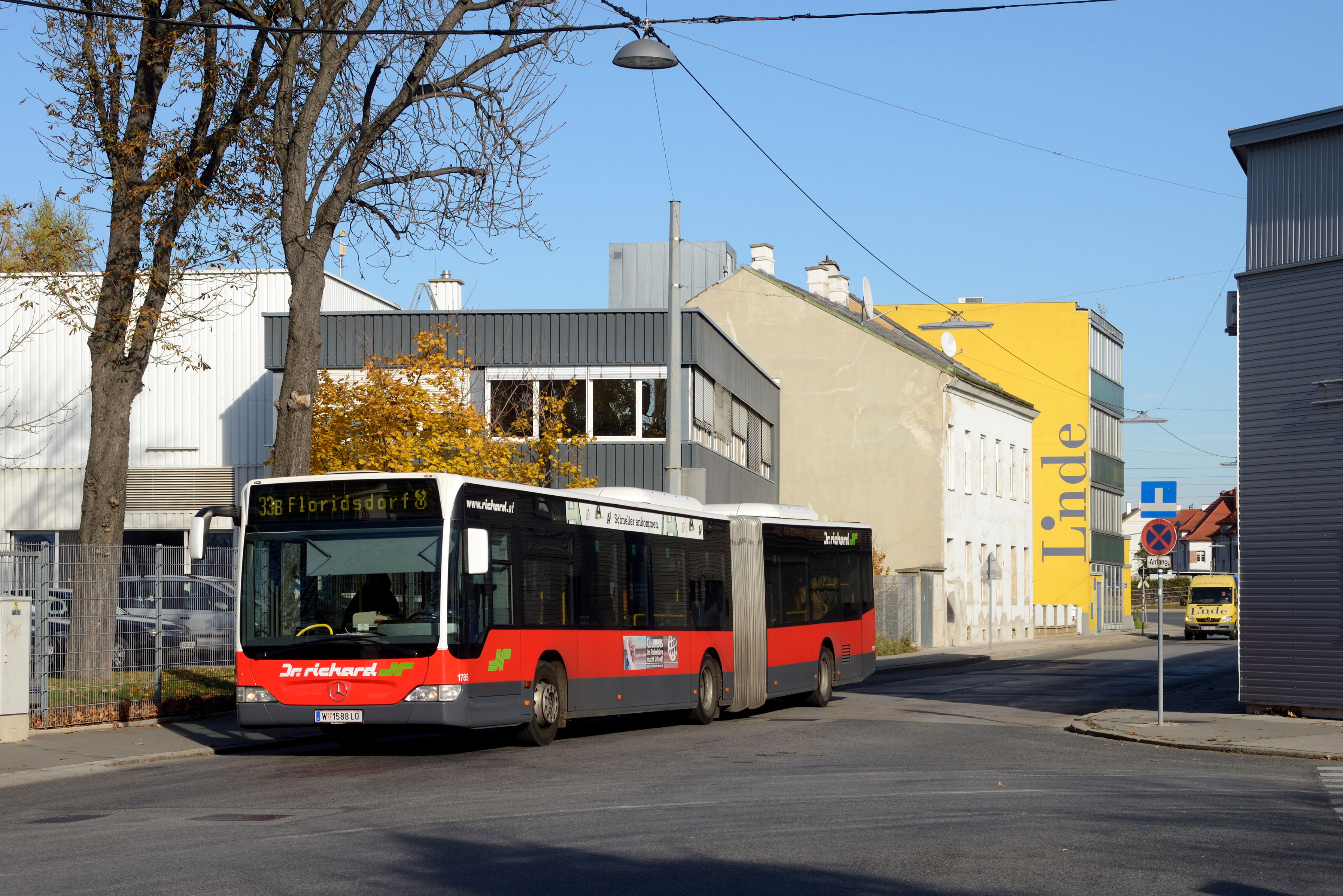 Mercedes Citaro G Facelift des Unternehmens Dr. Richard als Linie 33A in der Scheydgasse.